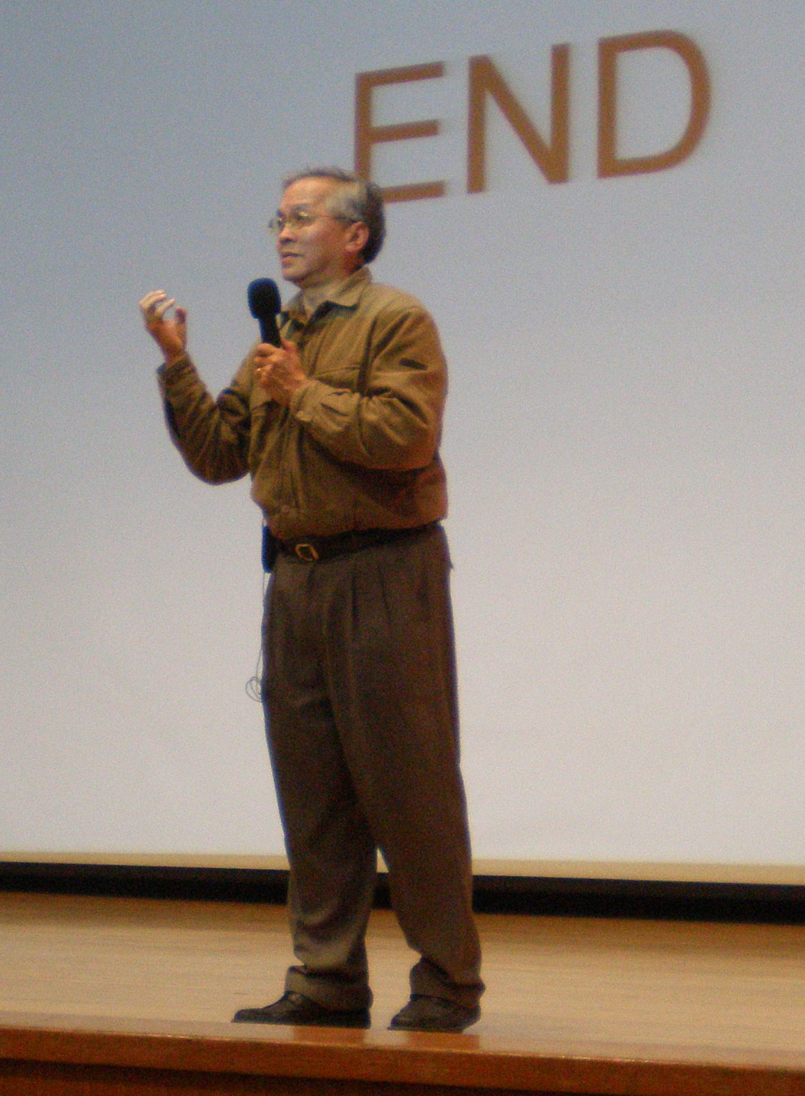 葉永烜教授於2010年2月21日在國立科學工藝博物館演講